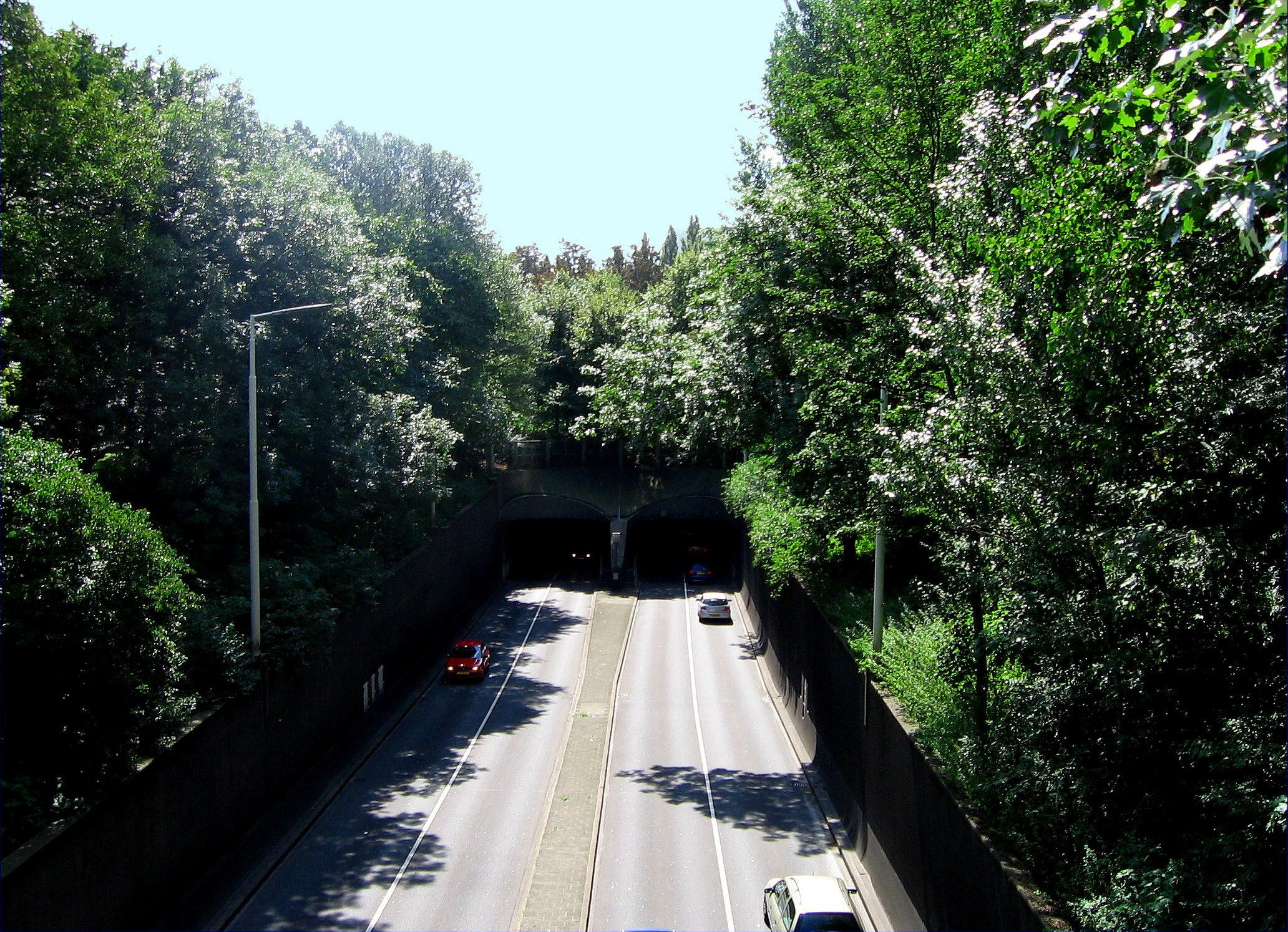 Noordelijke ingang van de Maastunnel in Rotterdam voor motorverkeer. Eigen werk.